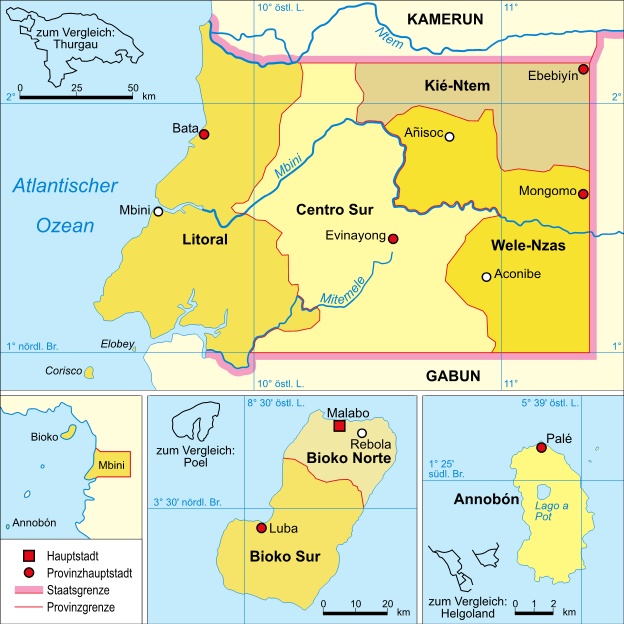 Politische Karte Äquatorialguineas